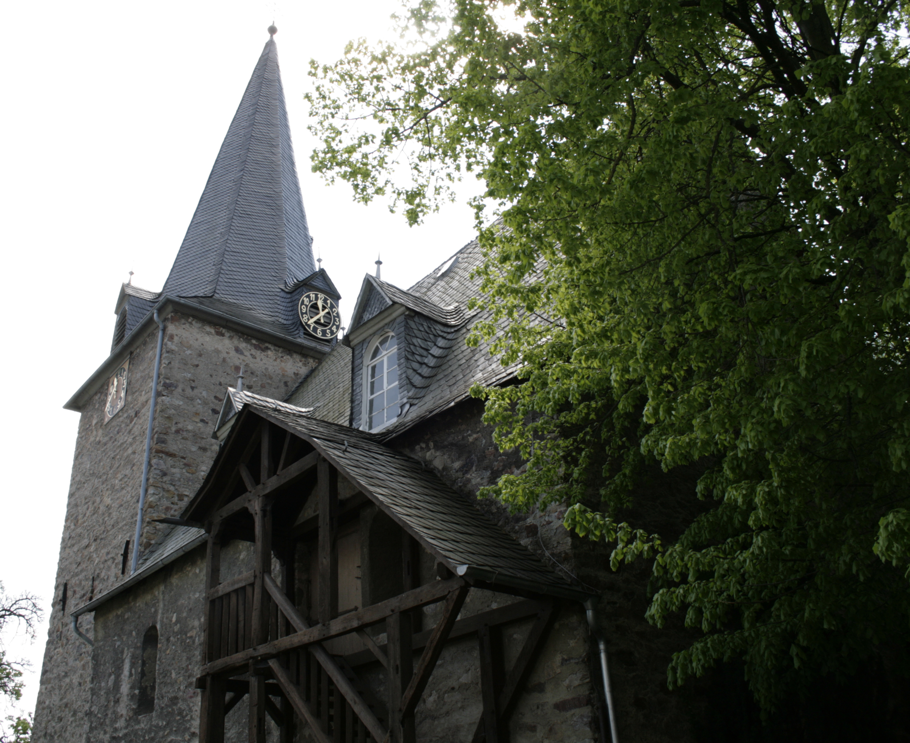 Kirche von Mensfelden, Deutschland, Nordseite